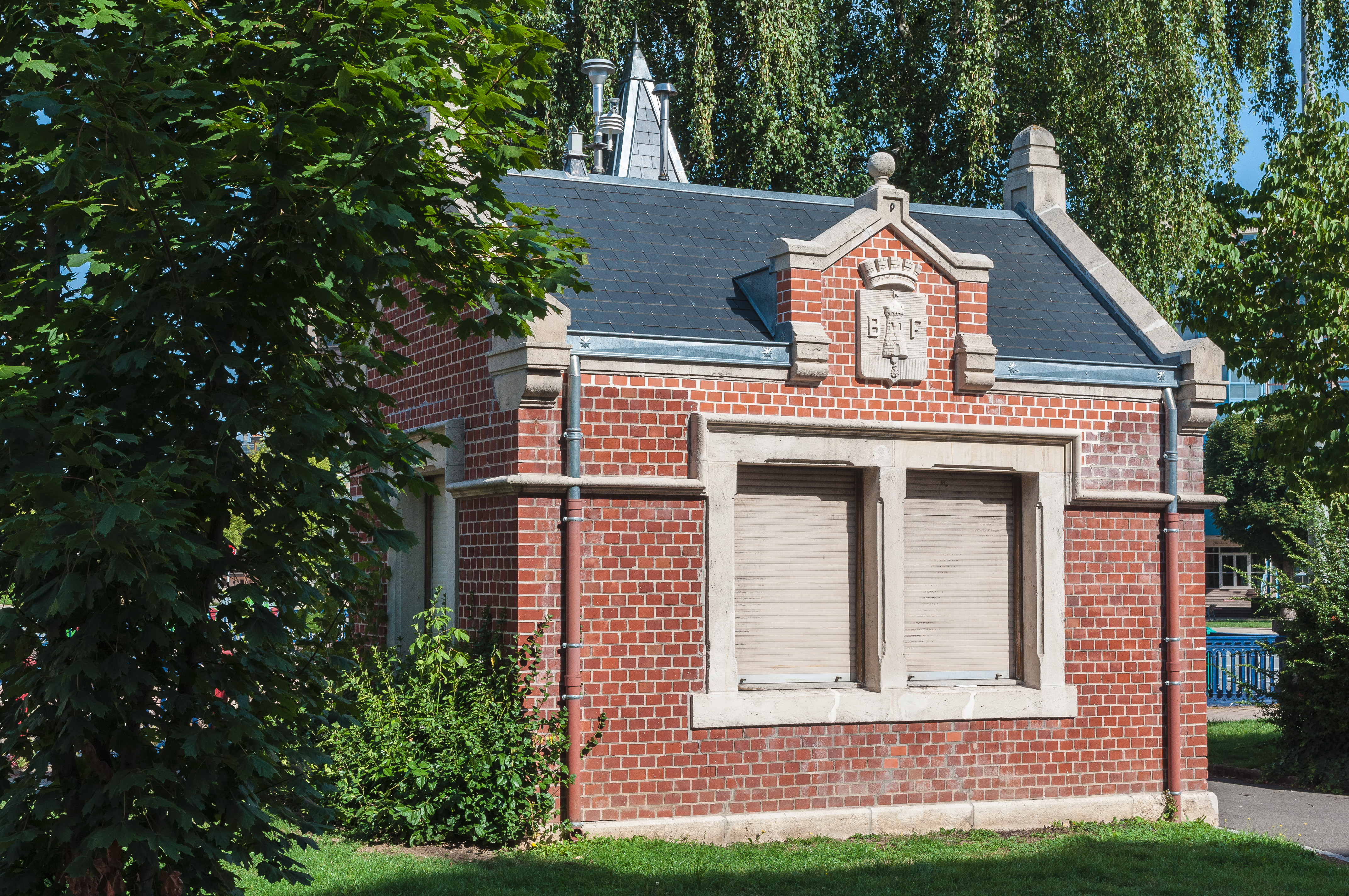 Cet édifice servait jadis à récolter l'octroi.